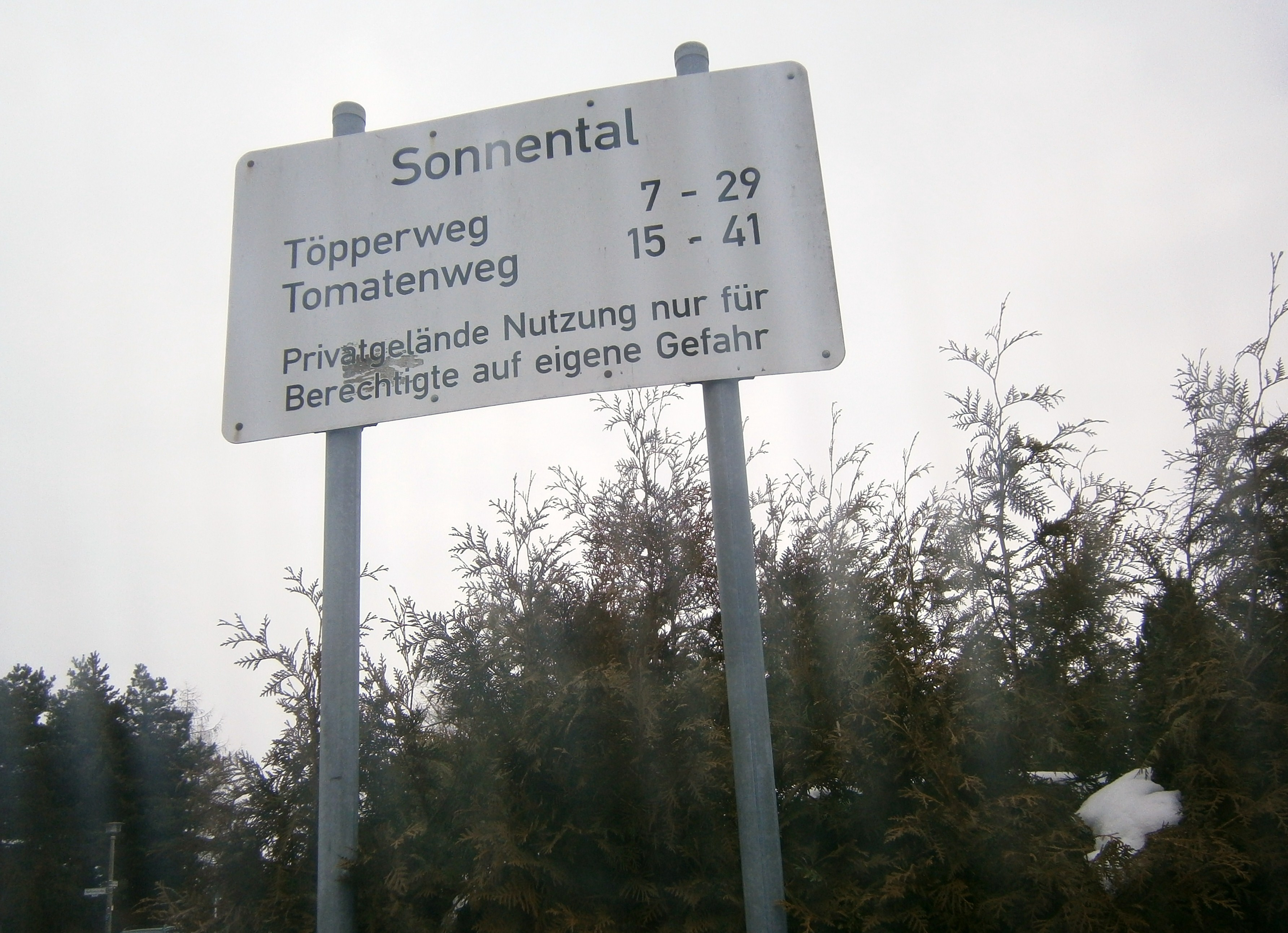 Siedlung Sonnental mit den Straßen Töpperweg und Tomatenweg ist eine aufgehobene Kleingartenanlage zur Wohnsiedlung in Berlin-Französisch Buchholz.